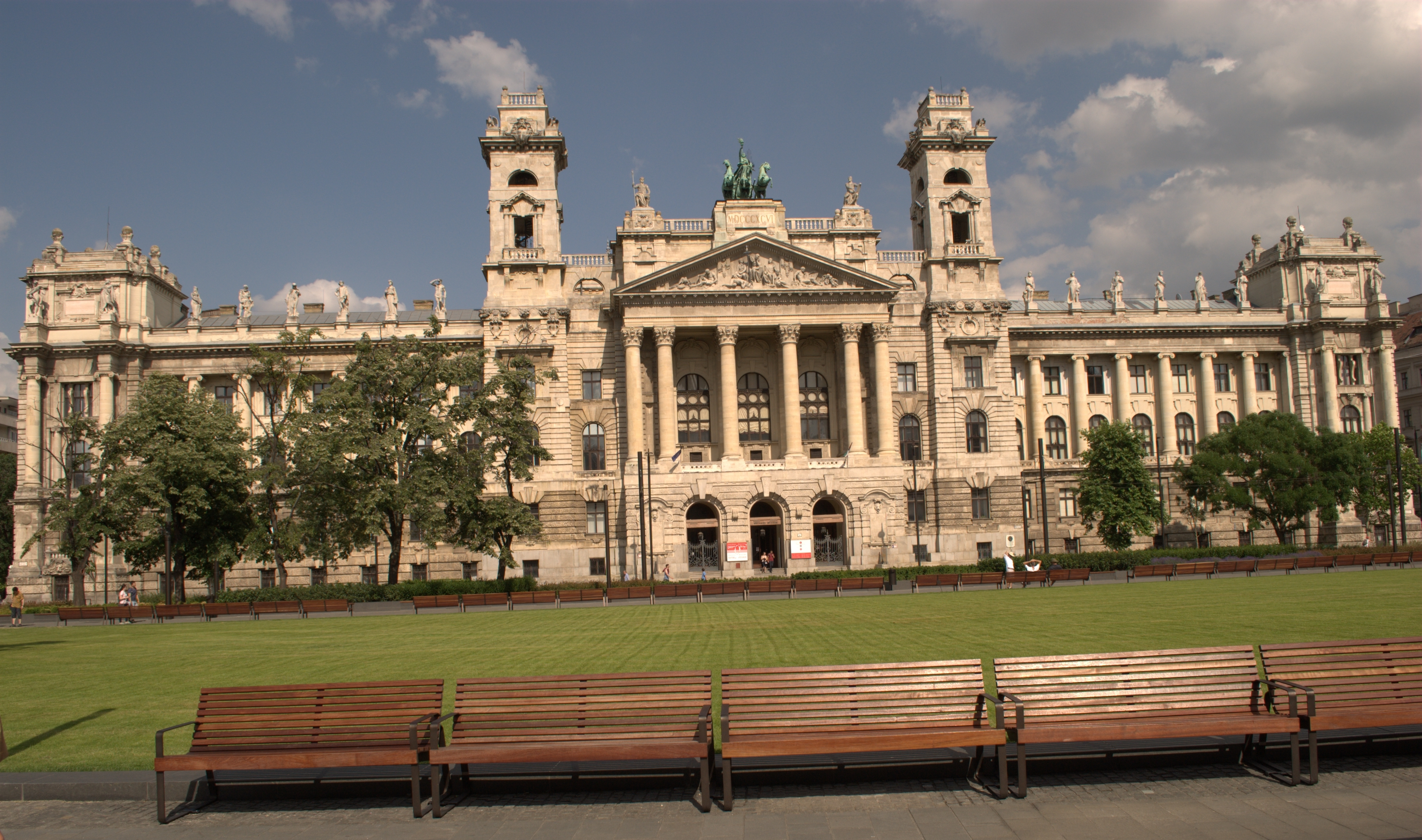 Budapest , 2015. június 13.